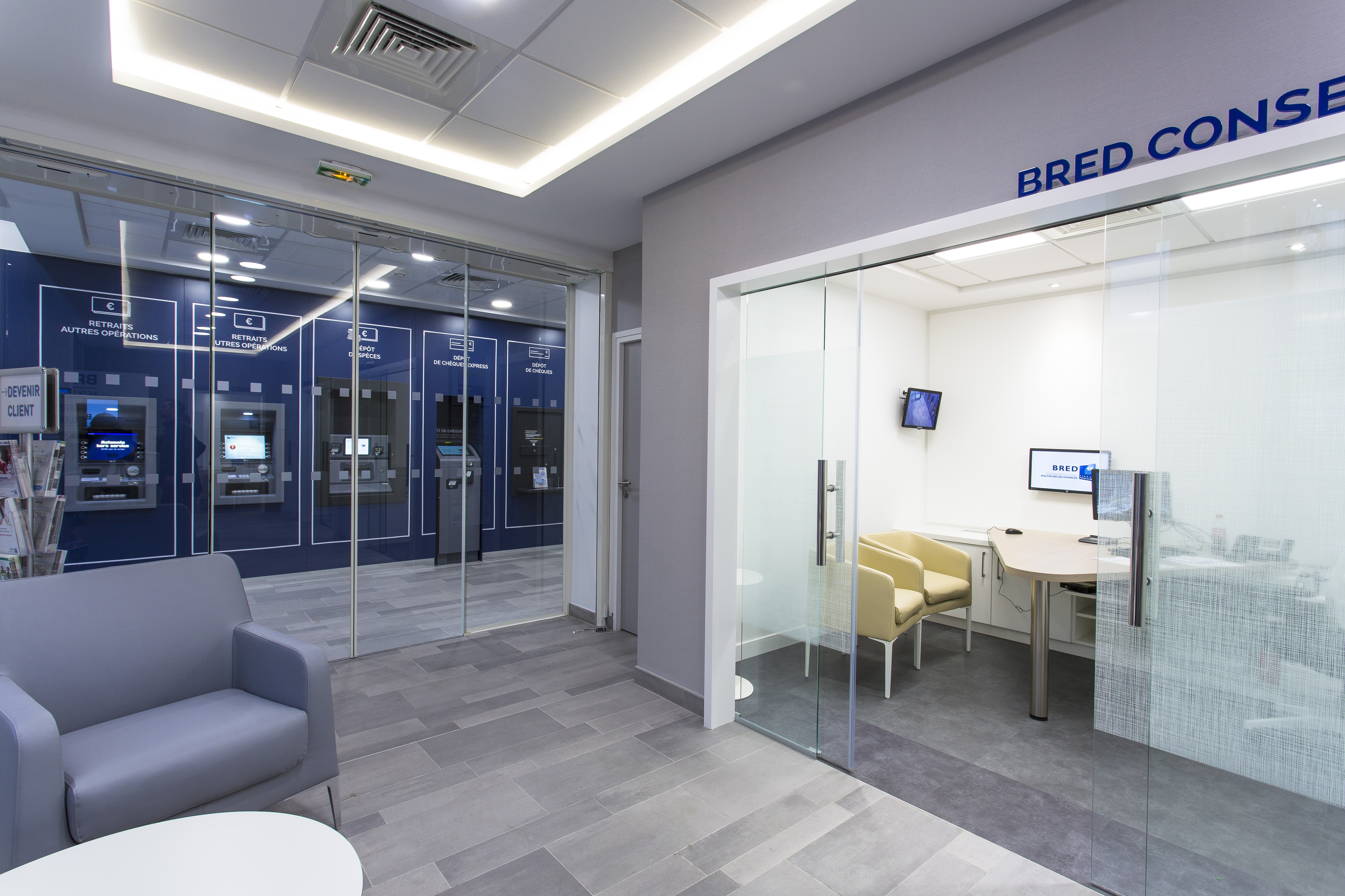 Agence BRED de la Défense (92)